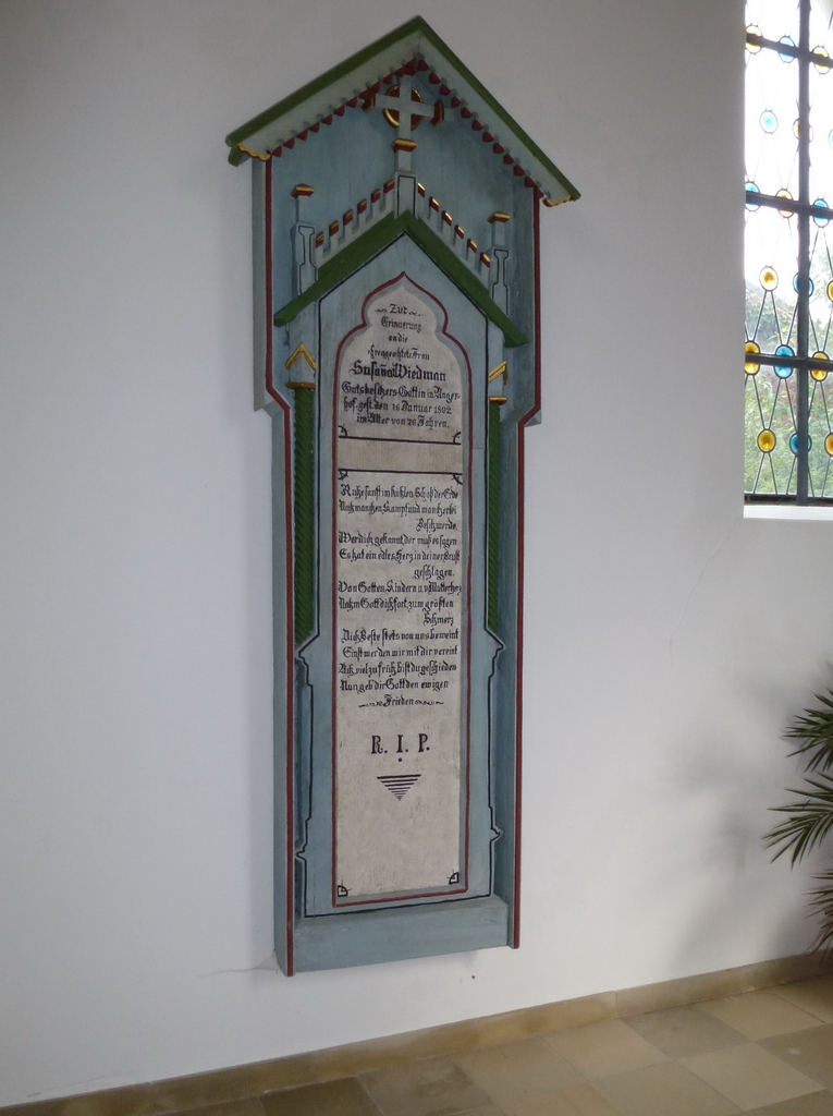 Hofkapelle neben dem Remisengebäude, DetailThis is a photograph of an architectural monument.